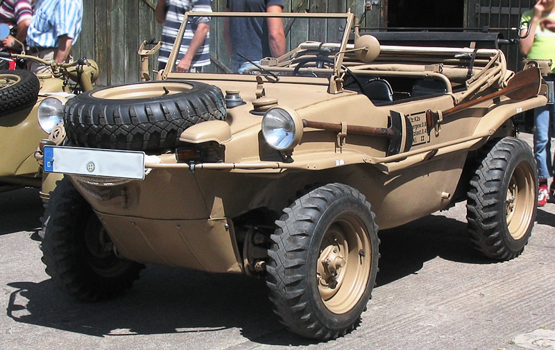 Beschreibung: VW Schwimmwagen Fotograf: Darkone, 2. Juli 2005